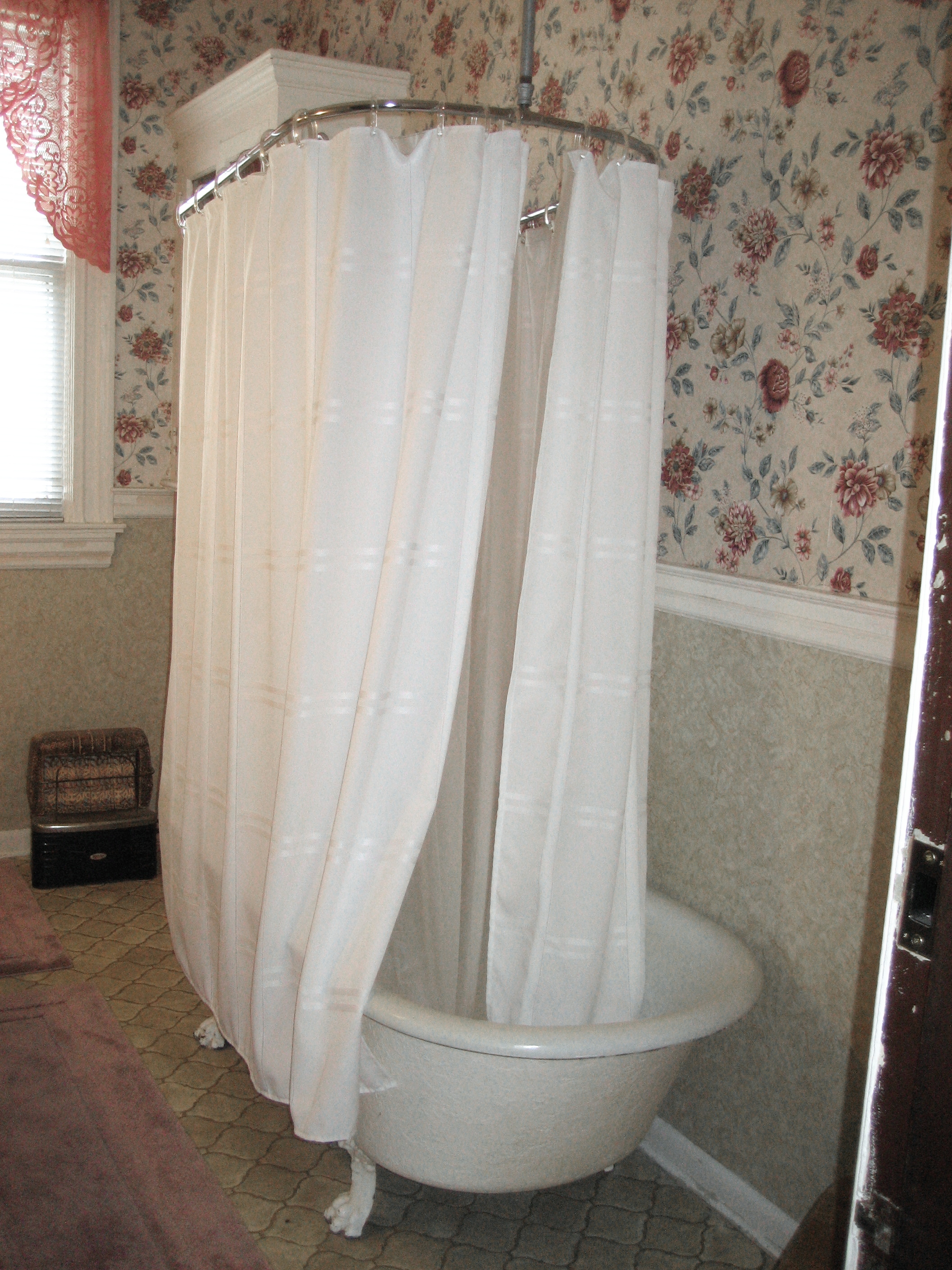 Bernheimer House, Port Gibson, Mississippi. Bathtub